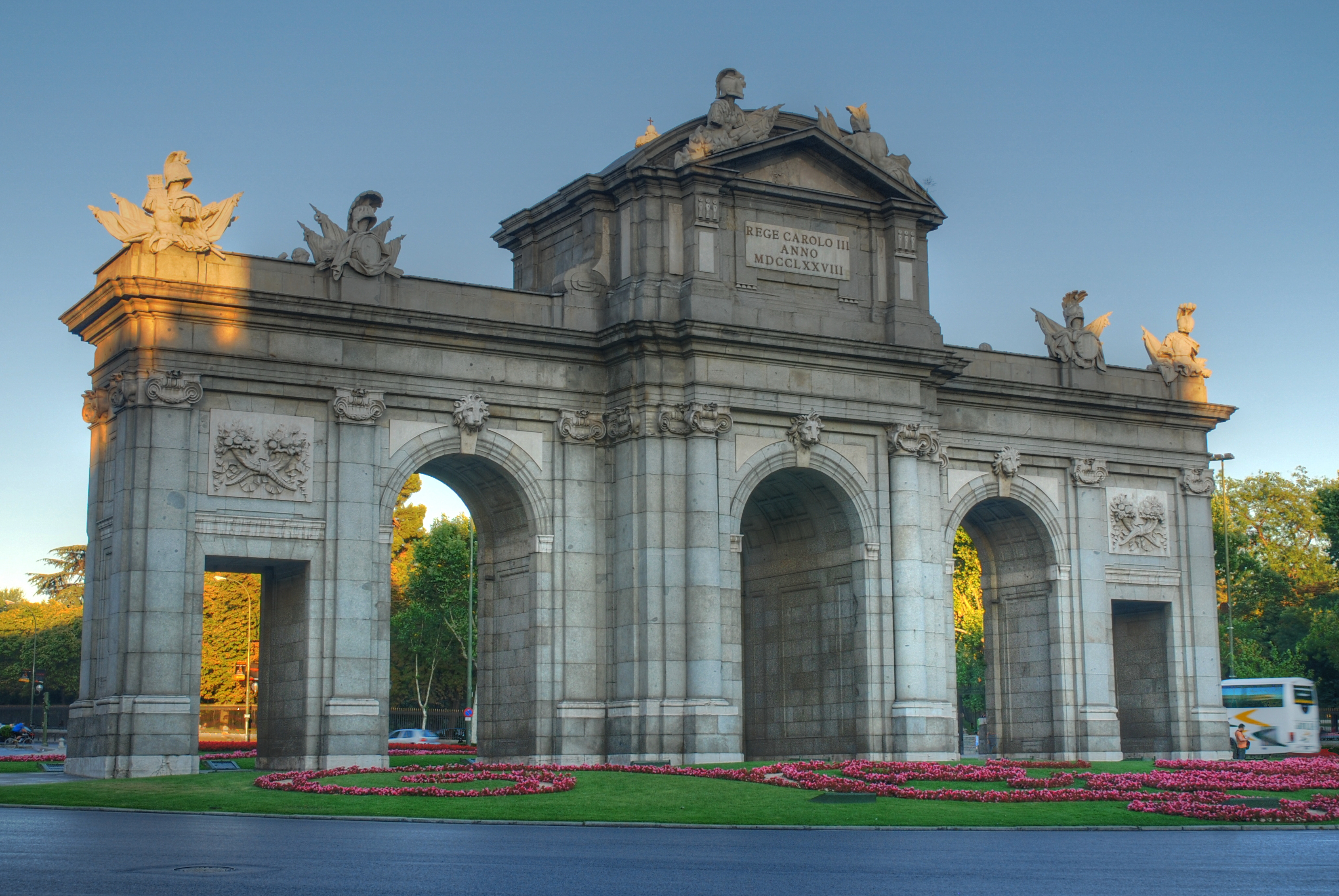 Puerta de Alcalá ("Alcalá Gate") in Madrid, Spain